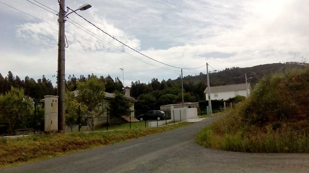 Vista do Lobeiro, O Val.